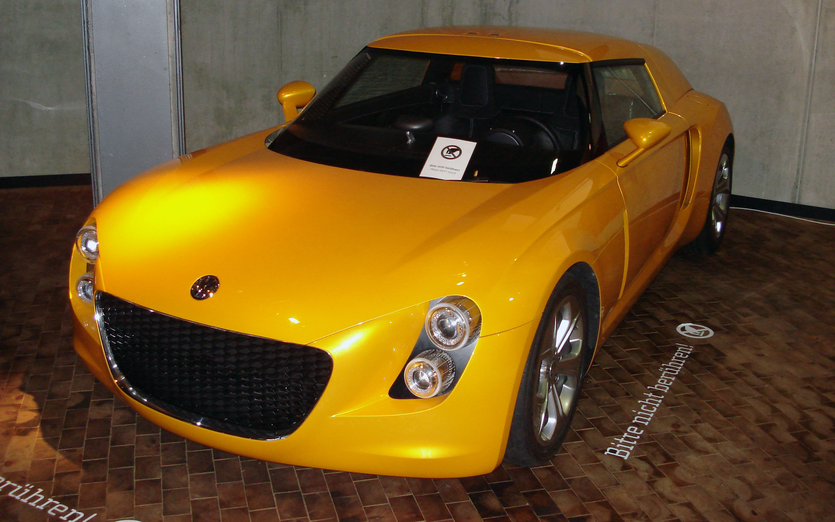 The VW Eco Racer in the Deutsches Technikmuseum Berlin